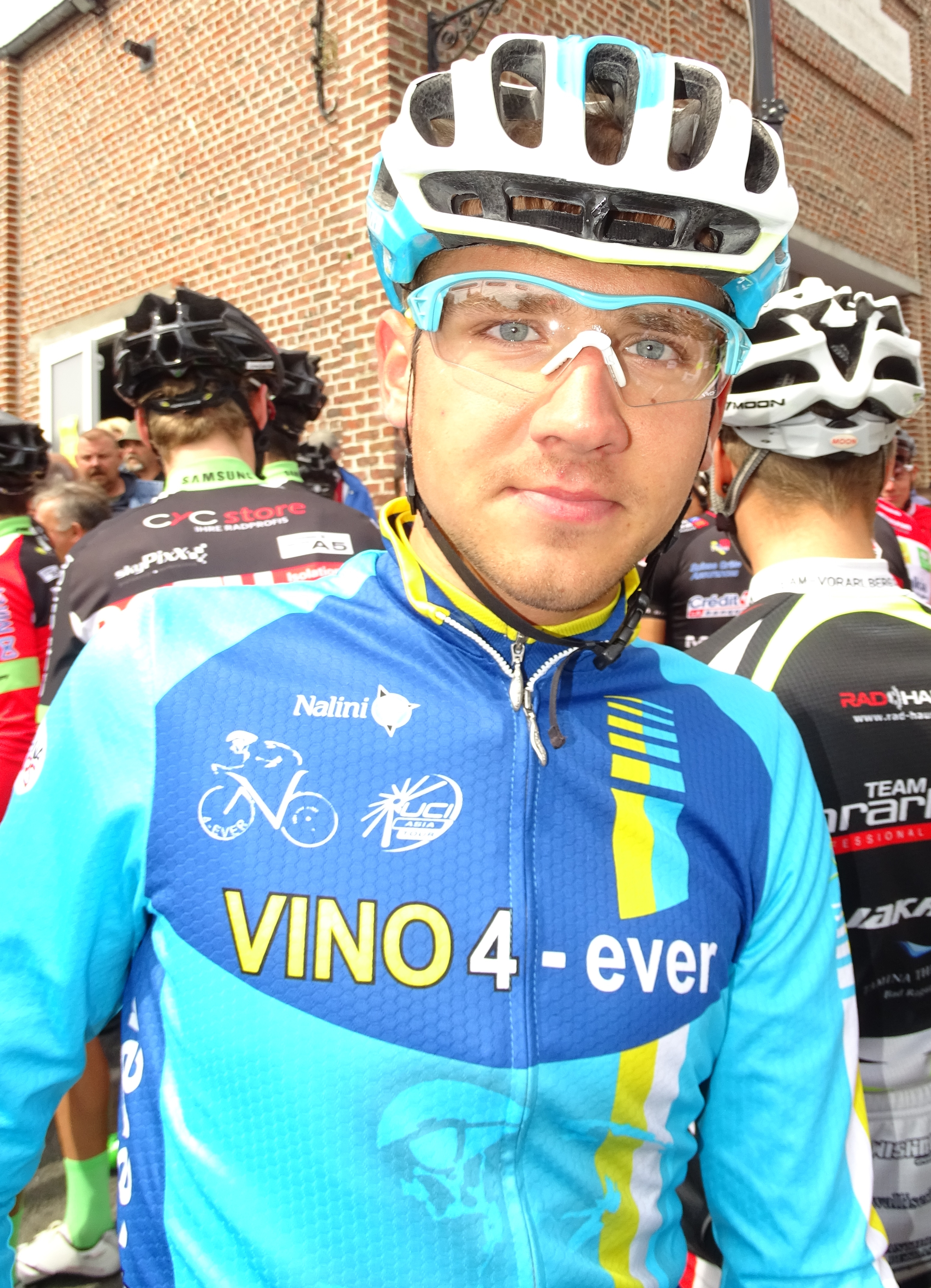 Reportage réalisé le mardi 25 août à l'occasion du départ et de l'arrivée du Grand Prix des Marbriers 2015 à Bellignies, Nord-Pas-de-Calais, France.